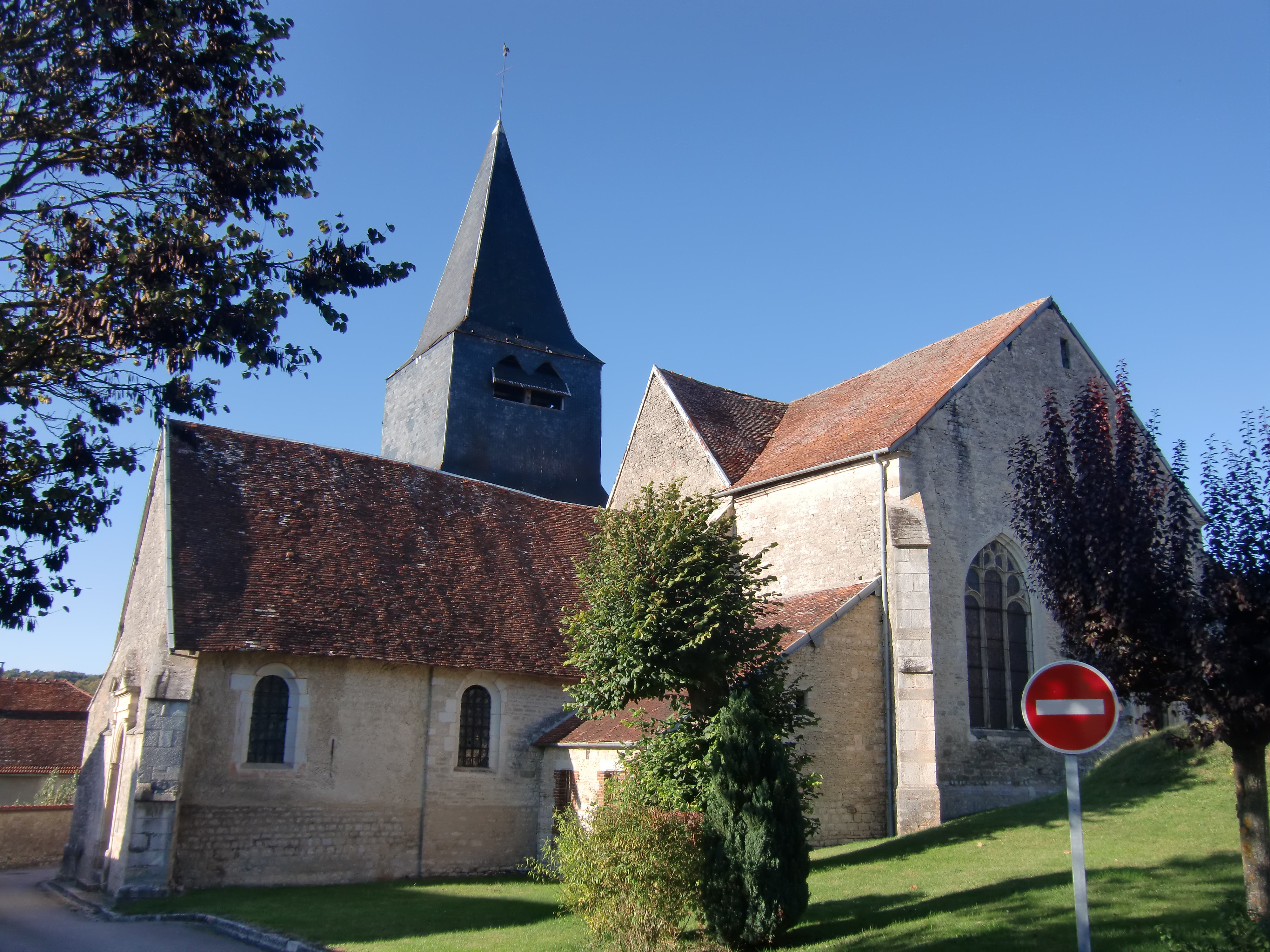 Église Saint-Aubin de Ville-sur-Arce (Aube, Champagne, France)